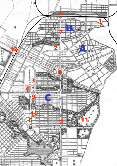 新京市地図（1932年）